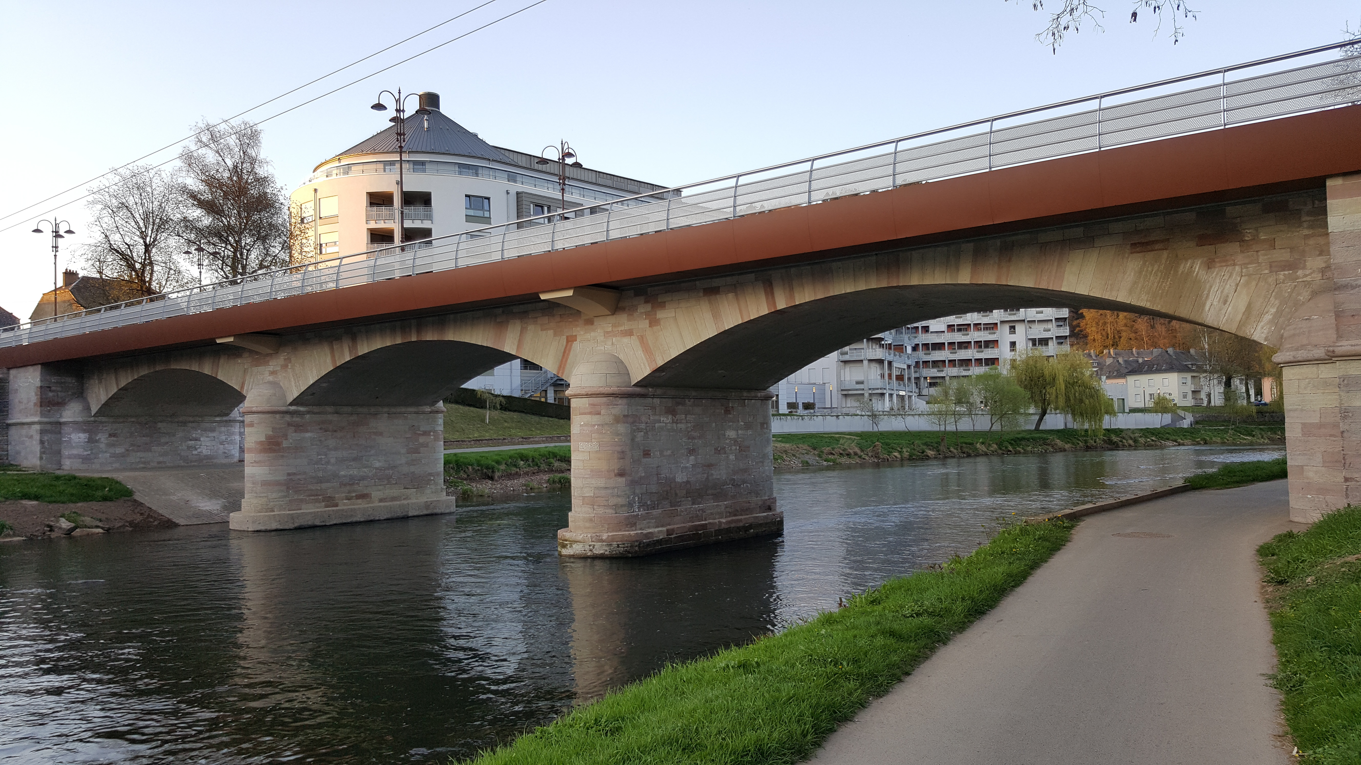 D'Sauerbréck zu Dikrech am Abrëll 2017